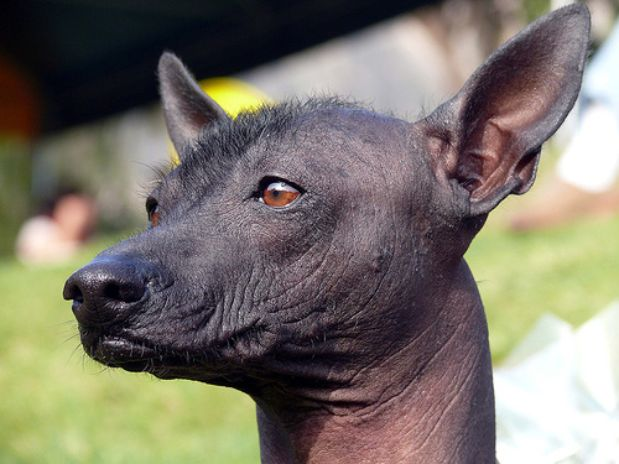 cara